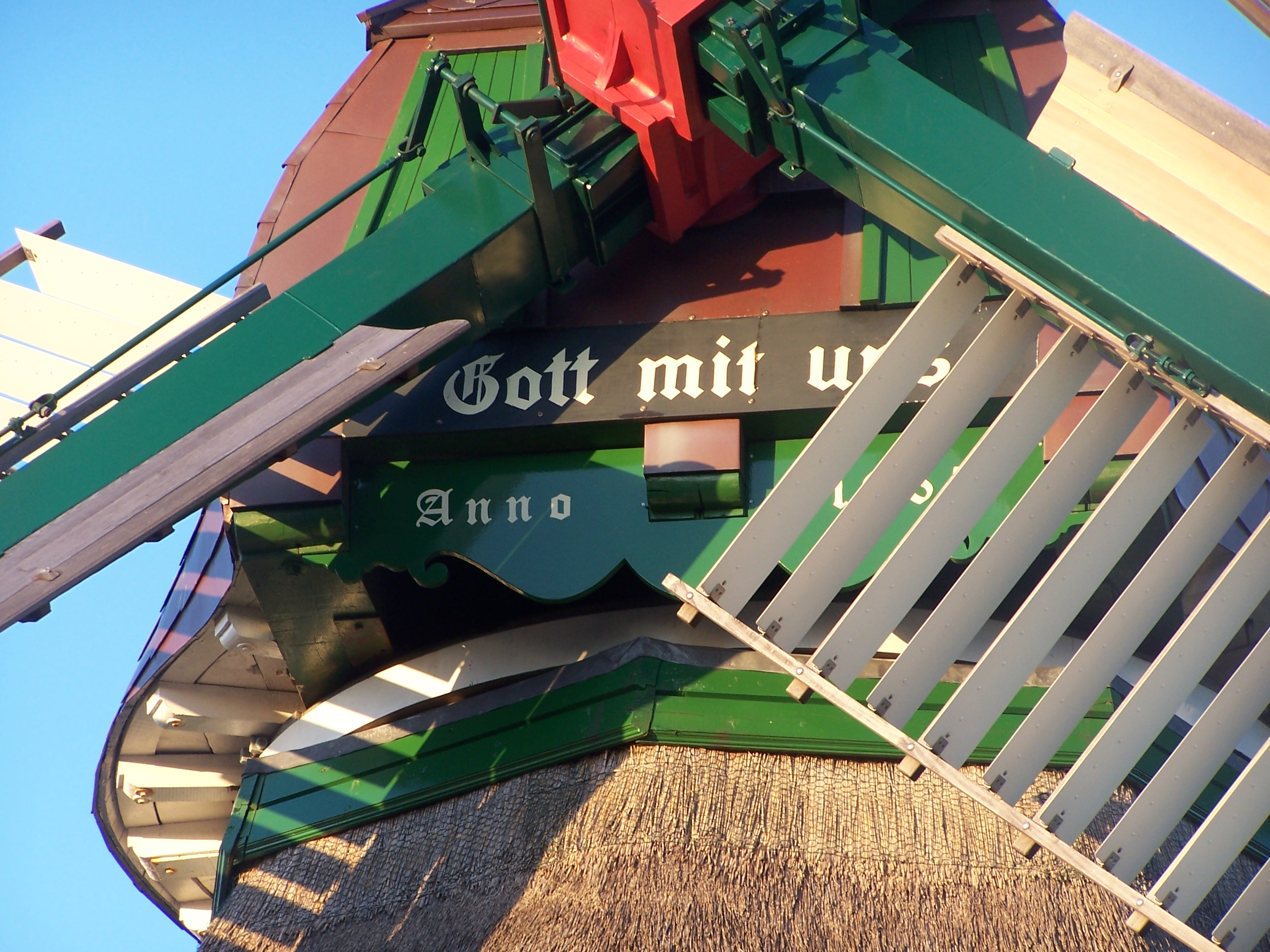 Windmühle "Gott mit uns" in Eddelak / Dithmarschen